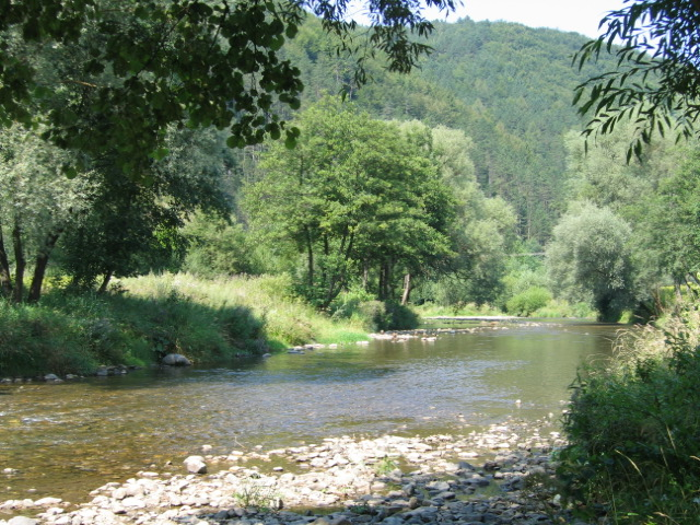 River Rajčanka near Porúbka